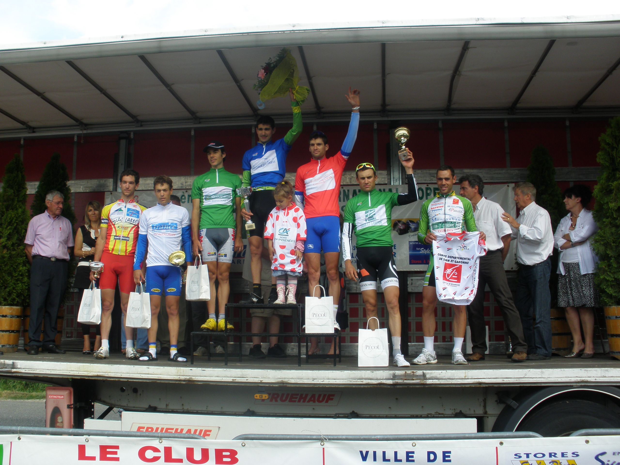 Le podium final du Tour du Tarn-et-Garonne 2010 : Antonin Hudrisier (meilleur coureur de 2ème catégorie), Guillaume Bonnet (meilleur espoir), Julien Mazet (2ème), Carl Naibo (1er, meilleur grimpeur et Champion du Tarn-et-Garonne 2010), Yohan Cauquil (3ème et plus combatif), Jean Mespoulède (4ème et vainqueur du Prix du Km 82),Romain Sdrigotti (Meilleur coureur de l'US Montauban) et l'organisateur Max Carcy.